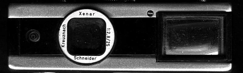 Kreuznach Schneider Xenar 25mm/2,8 four element Tessar type lens